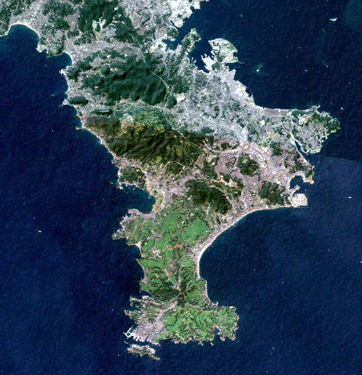 Miura Peninsula, Kanagawa, Japan.